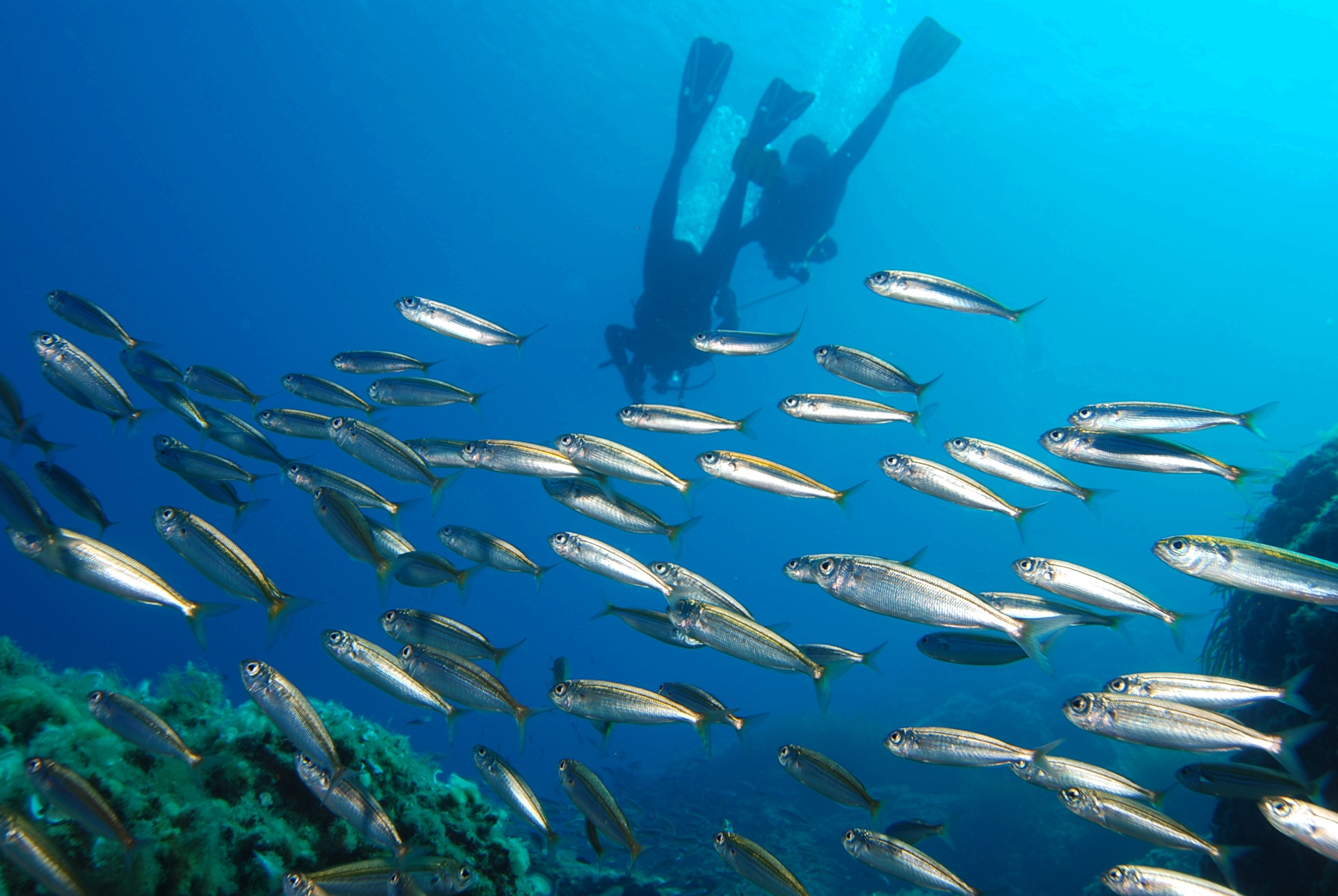 boops boops